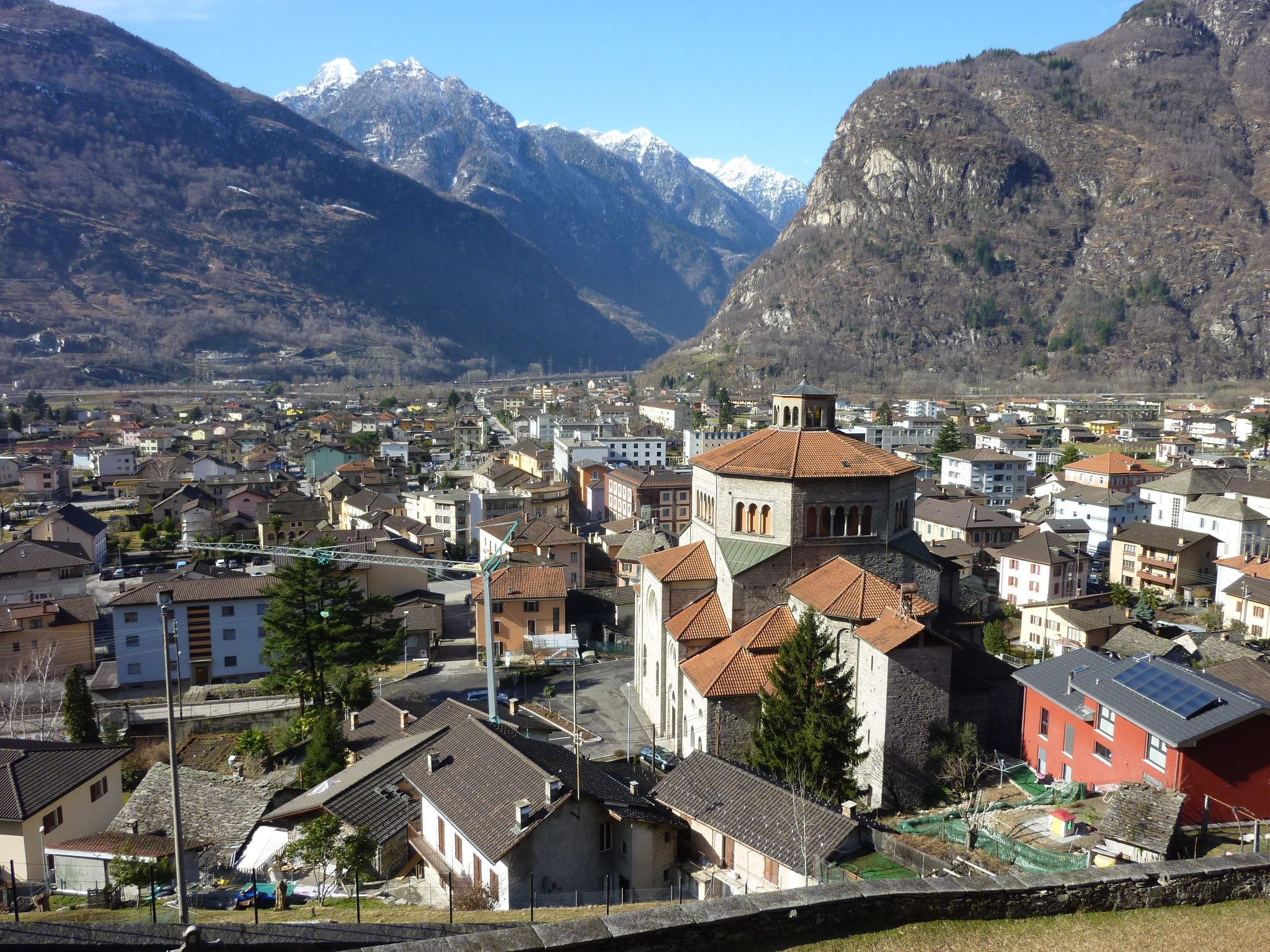 Biasca Richtung NW in die Leventina